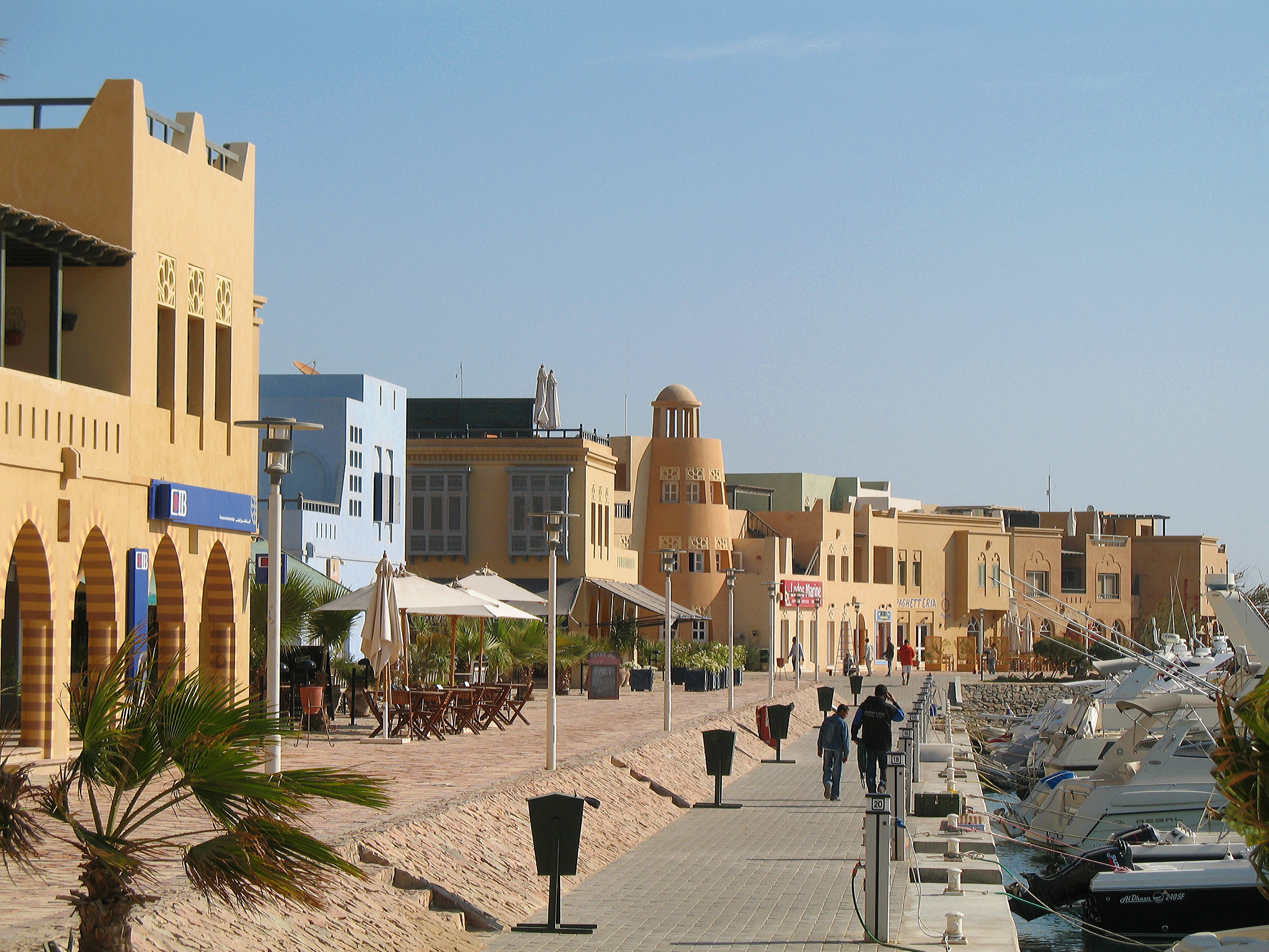 El Gouna (Egypt): Abu Tig Marina